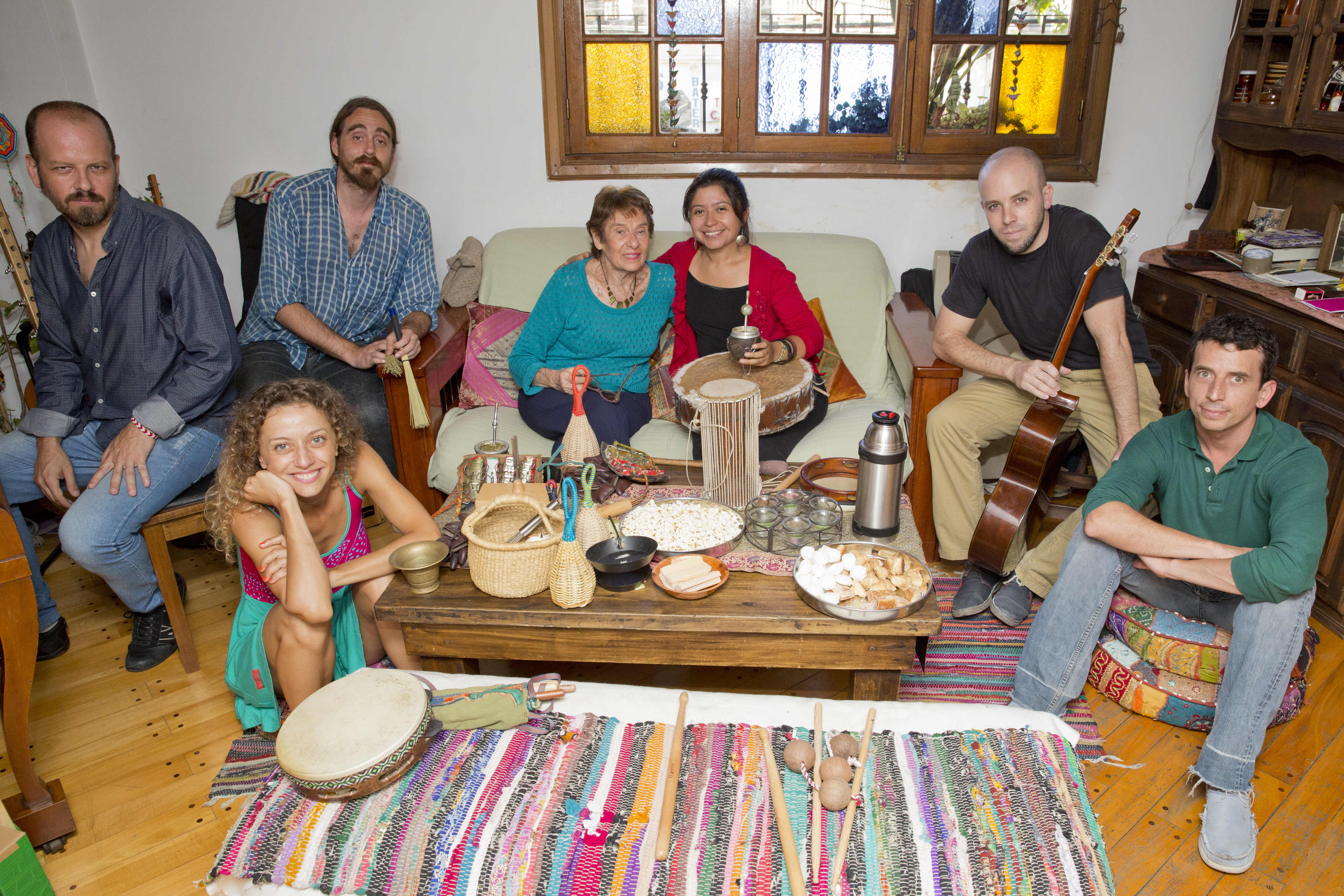 Los músicos argentinos Luna Monti, Aleix Tobías, Diego Schissi, Violeta Gainza, Nadia Larcher, Ignacio Vidal, Juan Quintero (Buenos Aires, 20 de febrero de 2015). Encuentro de los músicos previo a viajar al festival "Huella argentina", que se realizaría en la provincia de La Rioja (a 1500 km de Buenos Aires). Foto: Augusto Starita / Ministerio de Cultura de la Nación.